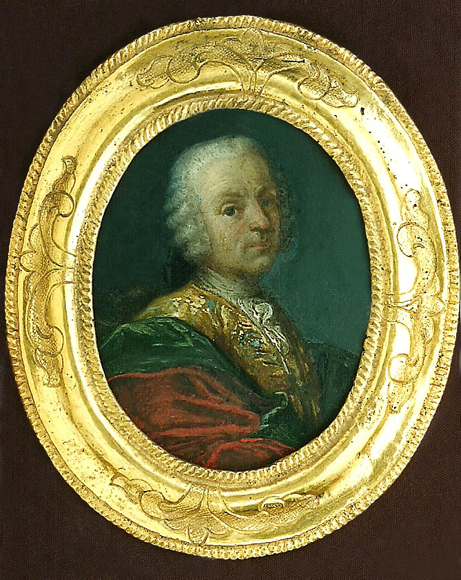 Selbstporträt „Franz Ludwig Hermann gemalt im 23. Jahr seines Lebens“, Öl auf Metallblech, bez./sign./dat. (1745) Dieses Werk stammt aus der Kunstsammlung des fkm (freunde der kemptener museen e.V.) Der fkm wurde gegründet, um bedeutende Kunstwerke für Kempten zu erhalten, deren Ankauf durch den Etat der Museen nicht bewerkstelligt werden kann. In den Museen sind daher viele Stücke zu bewundern, die mit Hilfe des fkm und der finanziellen Unterstüztung seiner Mitglieder erworben werden konnten.